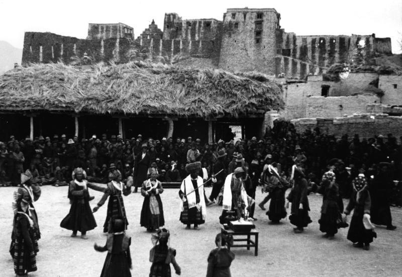 Tschitischio, Tänze